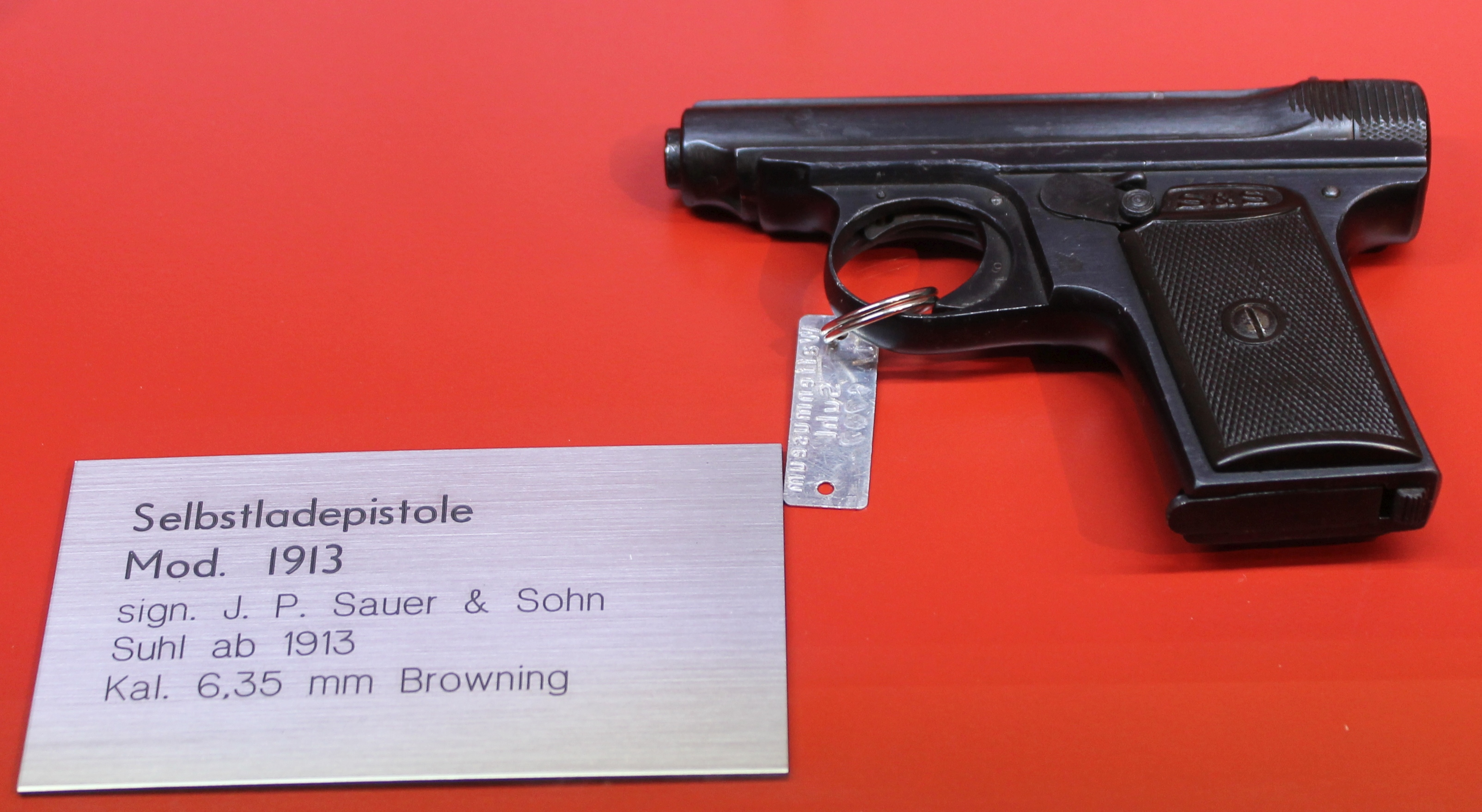 Selbstladepistole von Sauer & Sohn, Suhl im Waffenmuseum Suhl. Modell 1913, Kaliber 6,35 mm Browning.